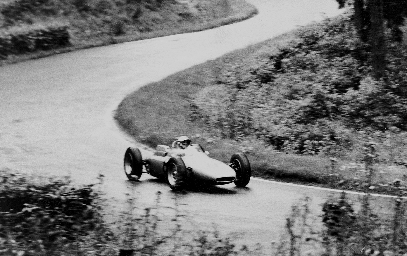 Großer Preis von Deutschland auf dem Nürburgring: Joakim Bonnier (Porsche 804) im Streckenabschnitt Hatzenbach